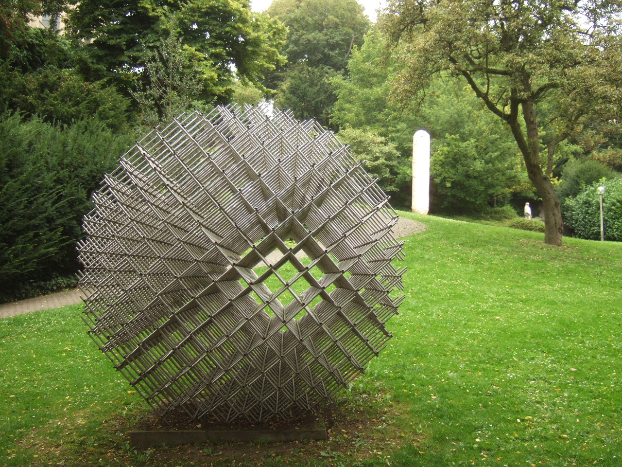 François Morellet: „Sphère - trames“ (1962) - Skulpturengarten Museum Abteiberg in Mönchengladbach (im Hintergrund - Franz West: „Flause“)